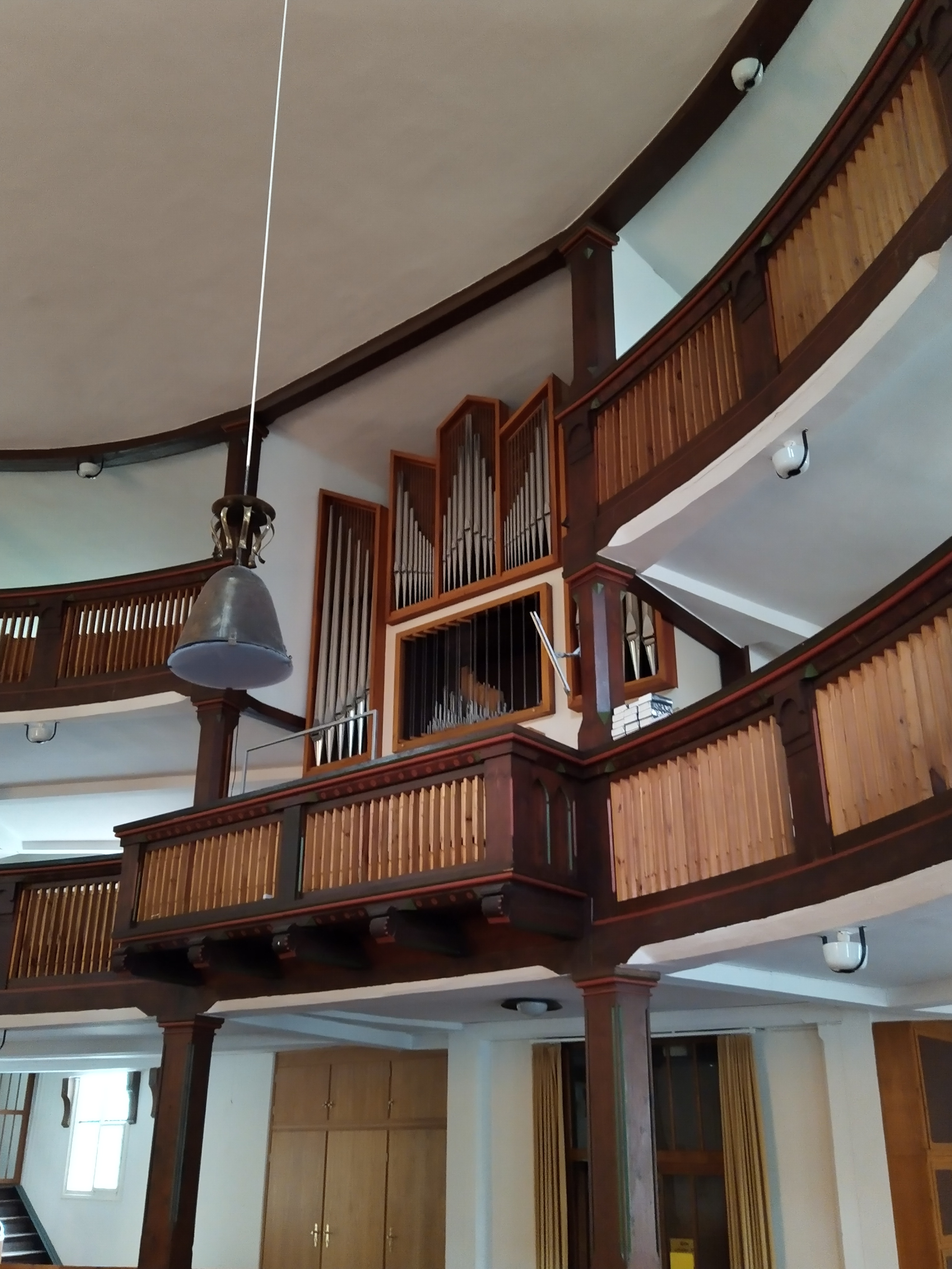 Jehmlichorgel und Empore der Friedenskirche in Bad Liebenstein